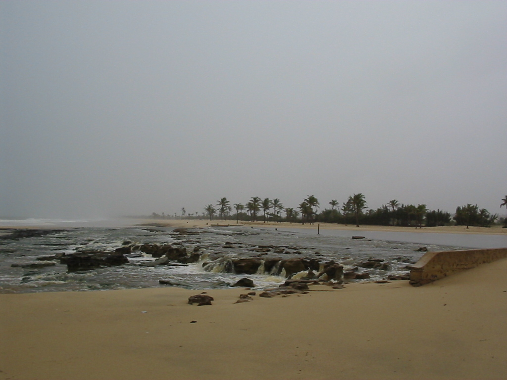 Barra do Cauipe - Encontro com o mar